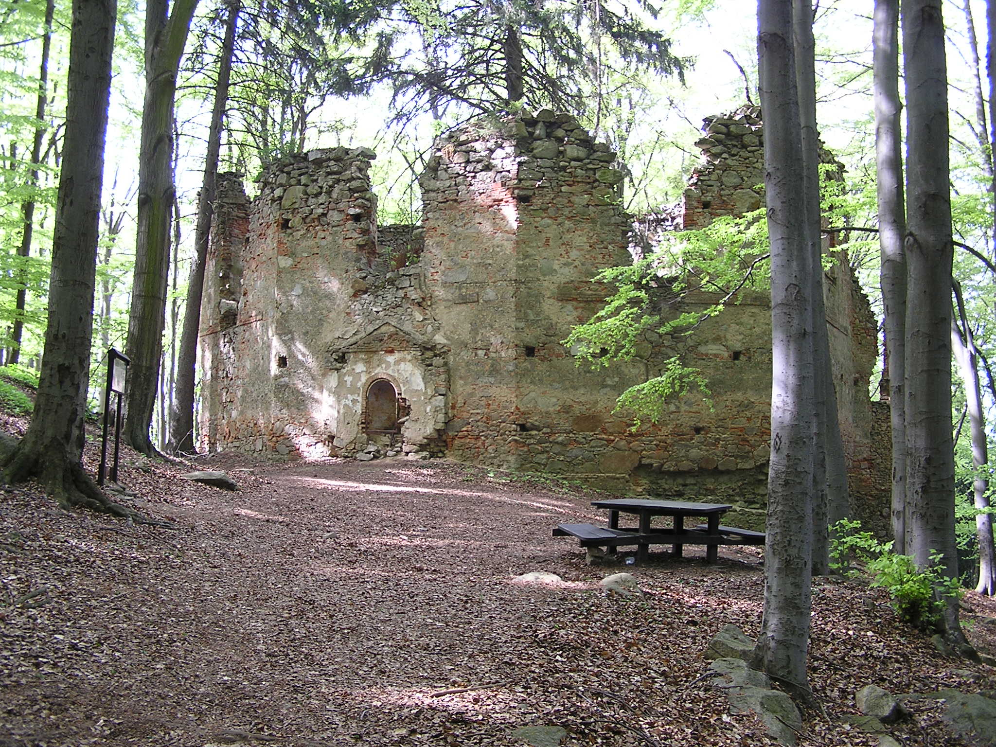 zřícenina na Malém Blaníku